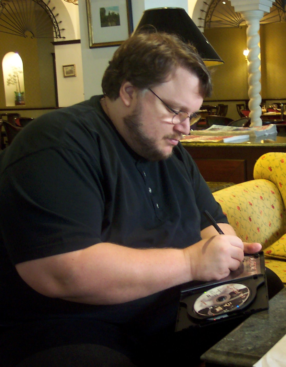 Guillermo del Toro siendo entrevistado por la revista española de historieta TRAMA 39, en 2002.